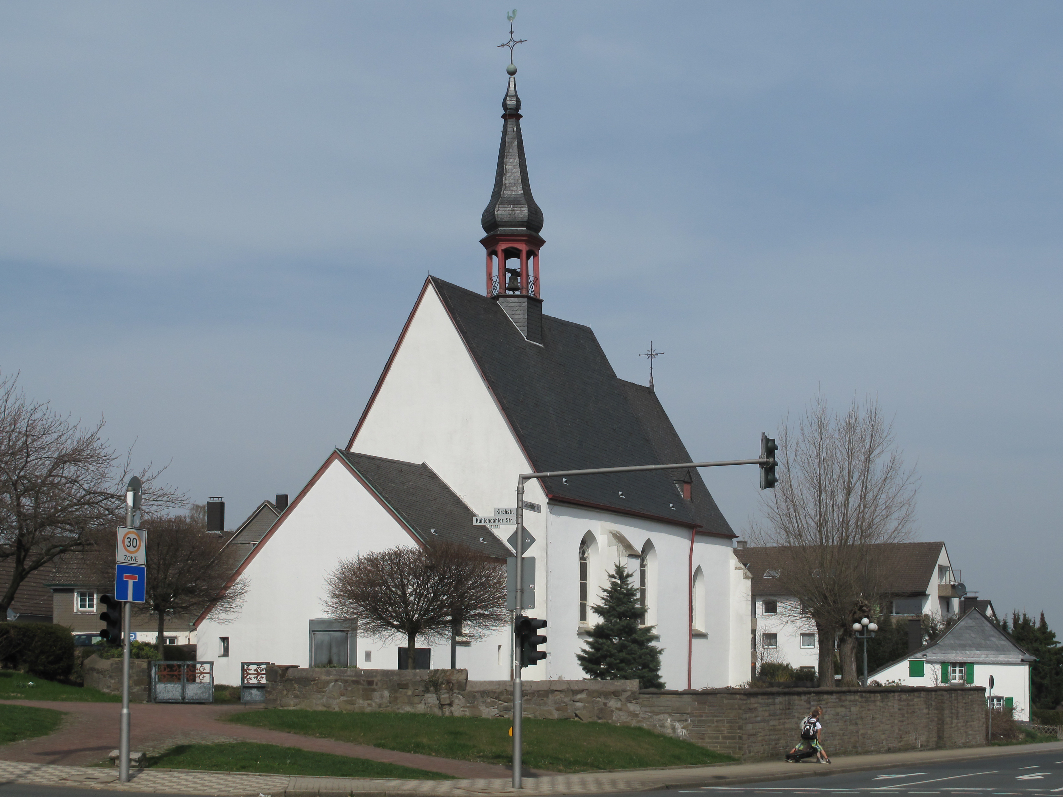 Tönisheide, evangelische kerk